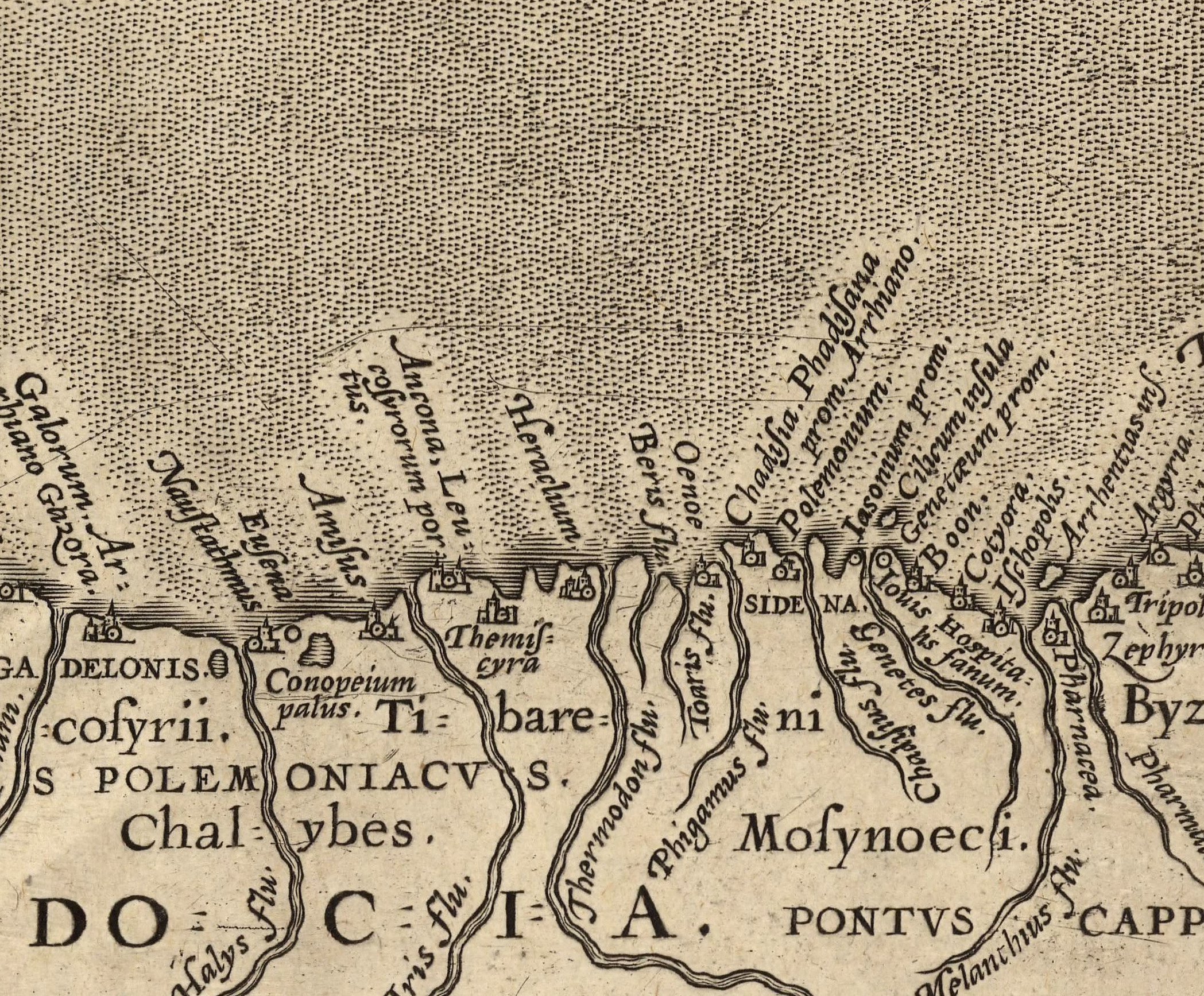 1590 yılında çizilen Karadeniz haritası.